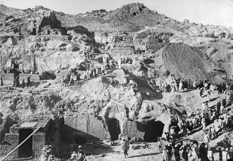 Im Ausgrabungsgebiet von Thebis/Aegypten! Blick auf die Ausgrabungen. Tausende von Eingeborenen werden hierbei beschäftigt, um wissenschaftliche Funde unter Leitung deutscher und englischer Gelehrter freizulegen.